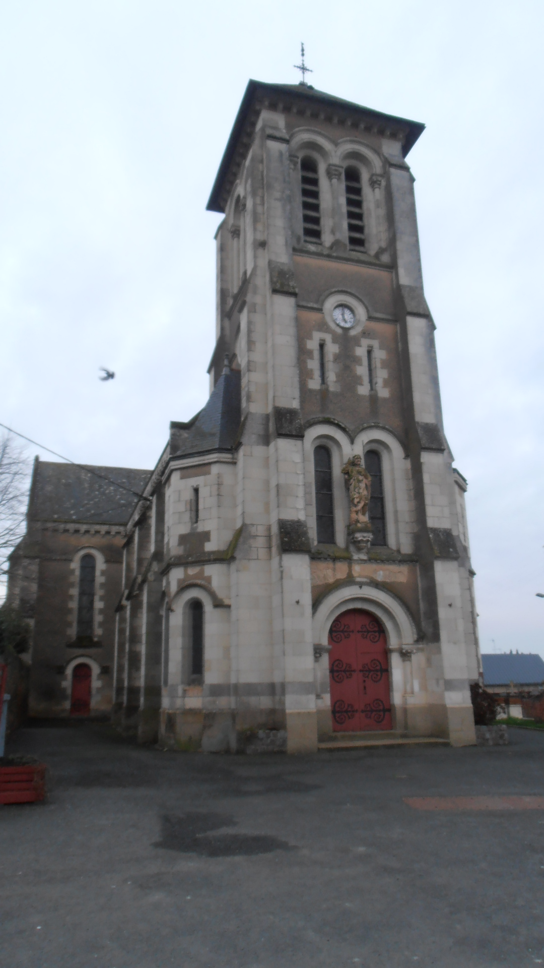 Église de la commune de Sœurdres (Maine-et-Loire, France).